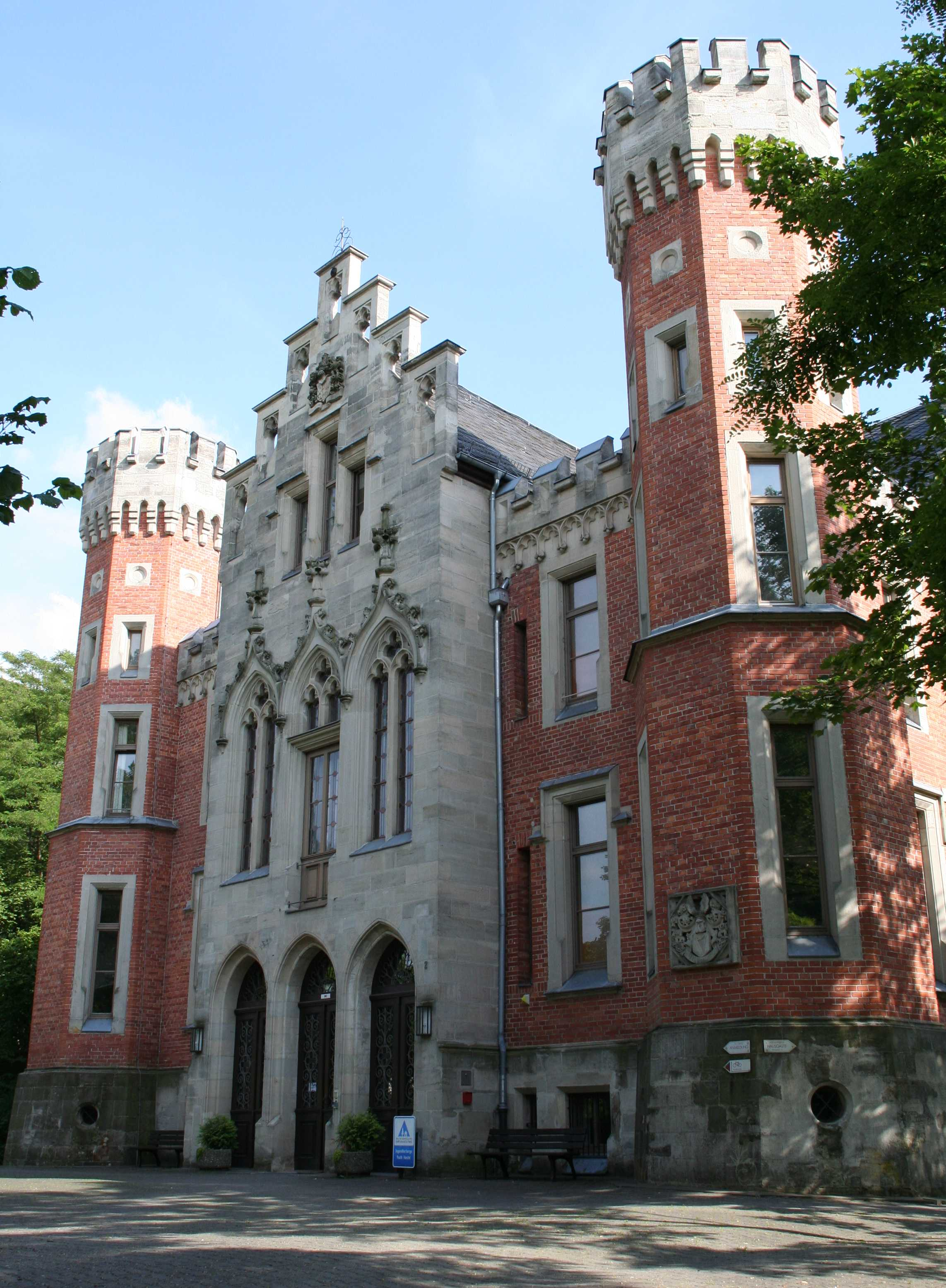 Schloss Ketschendorf in Coburg im Stadtteil Ketschendorf, heute Jugendherberge